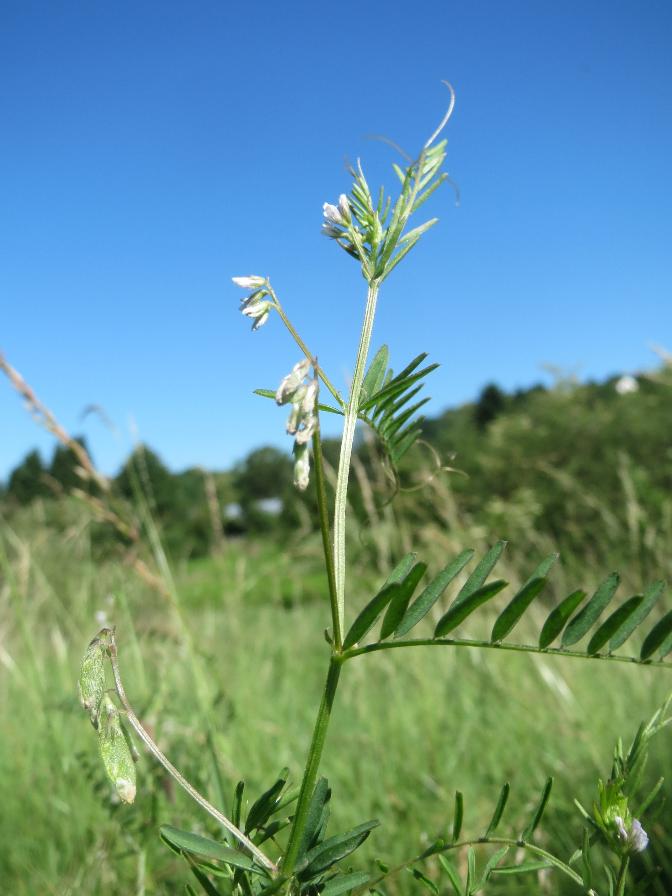 Rauhaarige Wicke (Vicia hirsuta) im Almet in Sankt Arnual